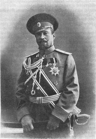 генерал Володченко, Николай Герасимович